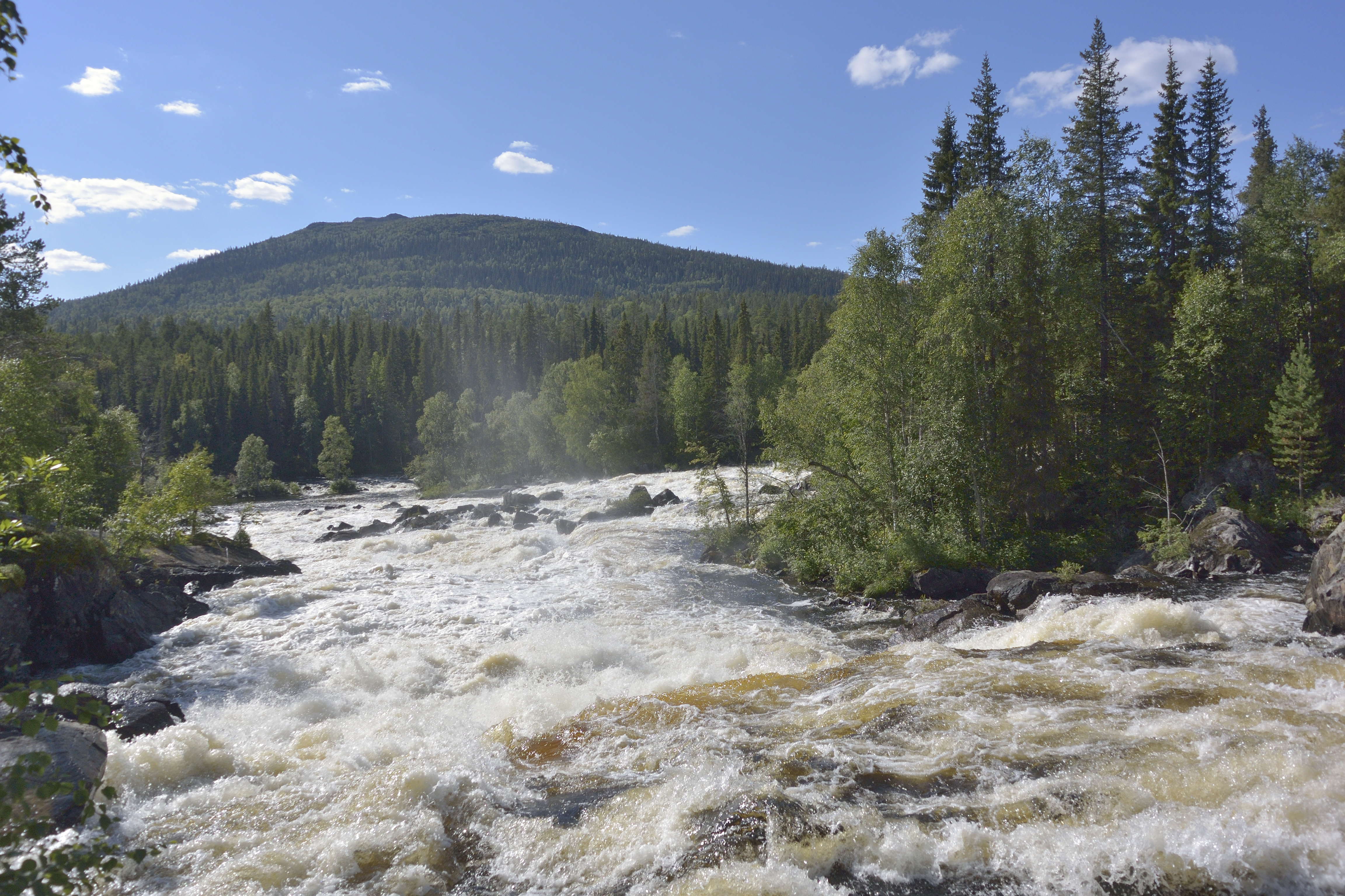 Паанаярви: Западная граница национального парка совпадает с государственной границей России с Финляндией. Со стороны финской границы к “Паанаярви” примыкает национальный парк “Оуланка”,Лоухский район, This image is related to the protected area of Russia number 1000069